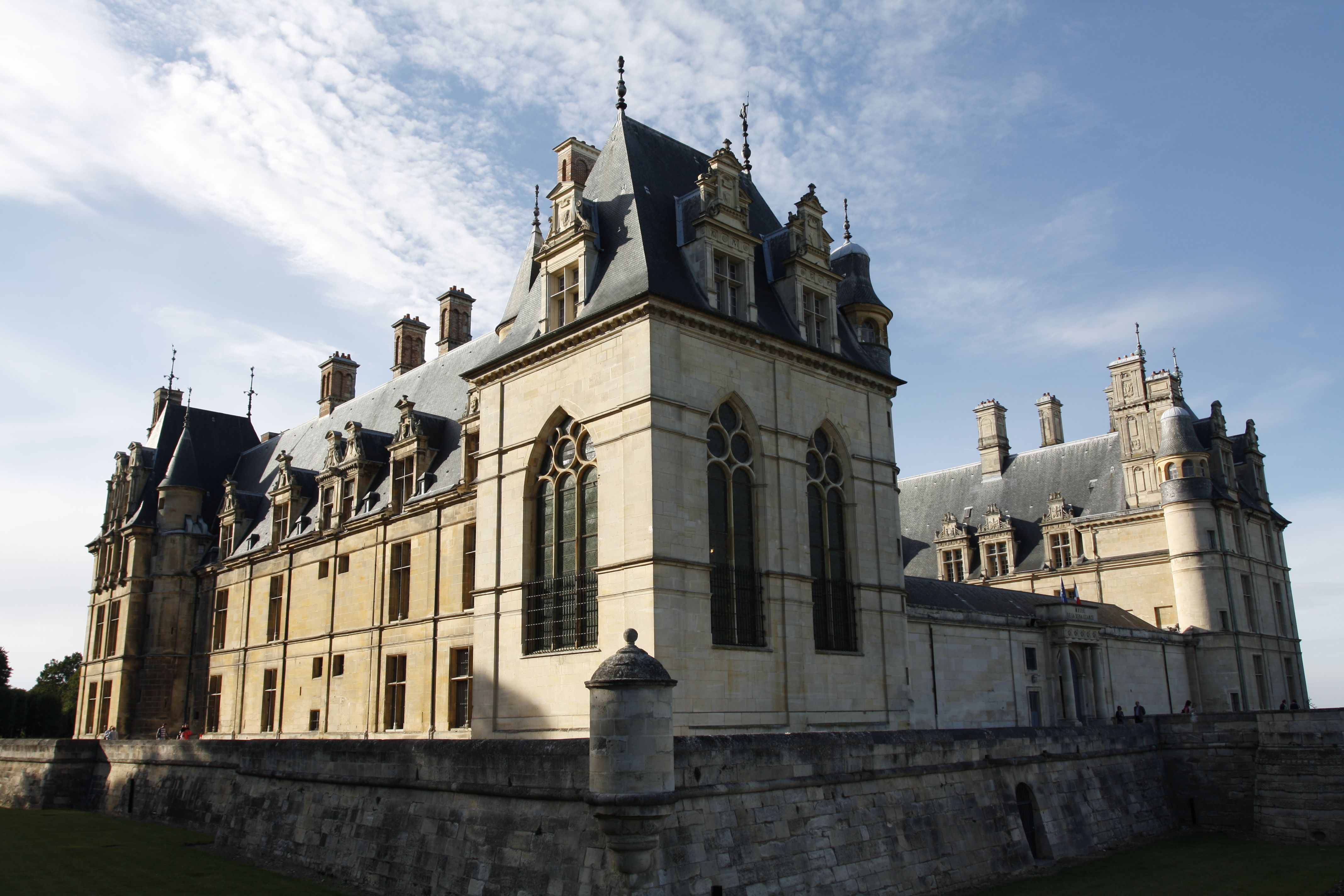 Chateau d'Ecouen